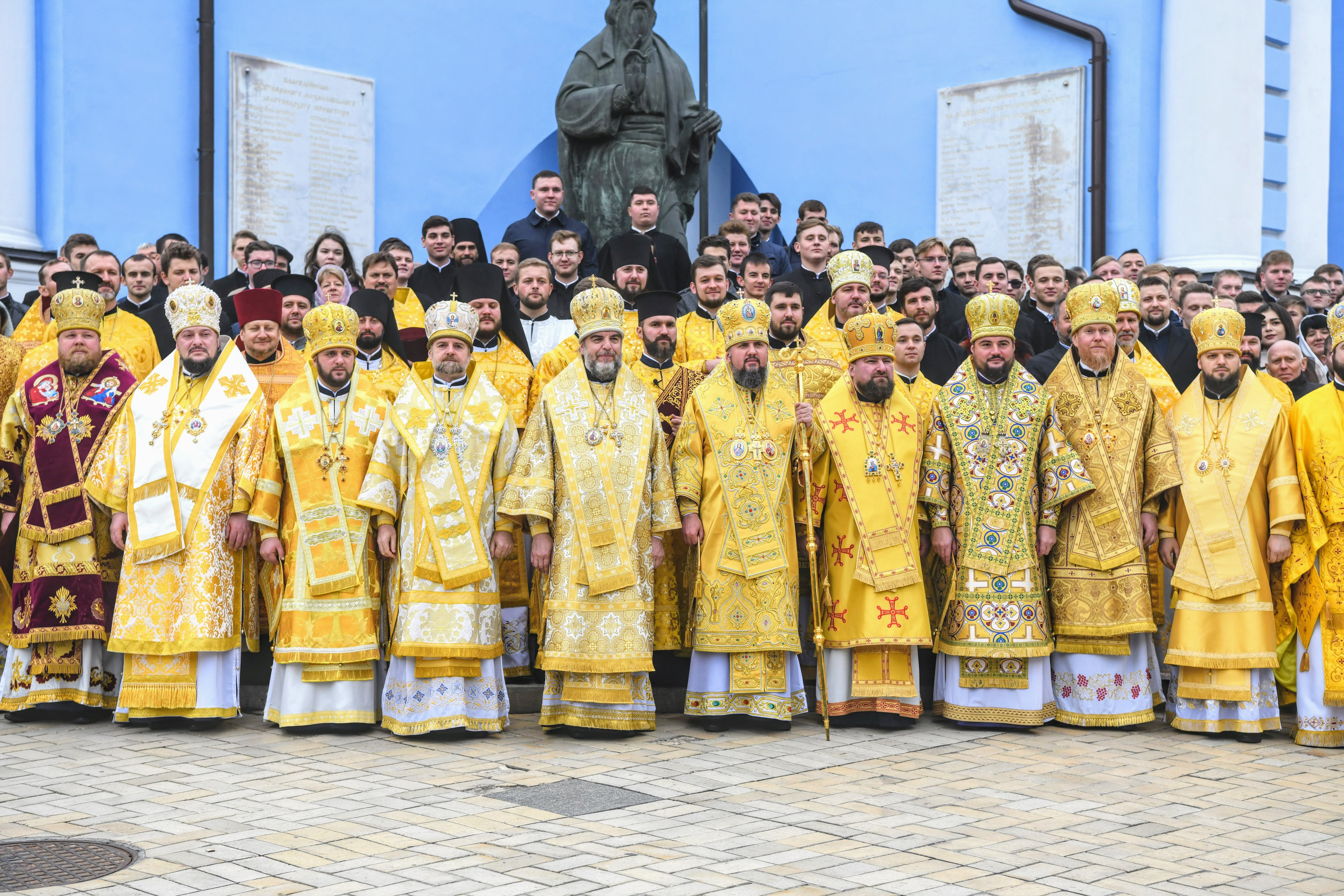 Митрополит Епіфаній із духовенством ПЦУ та студентами КПБА в Київі